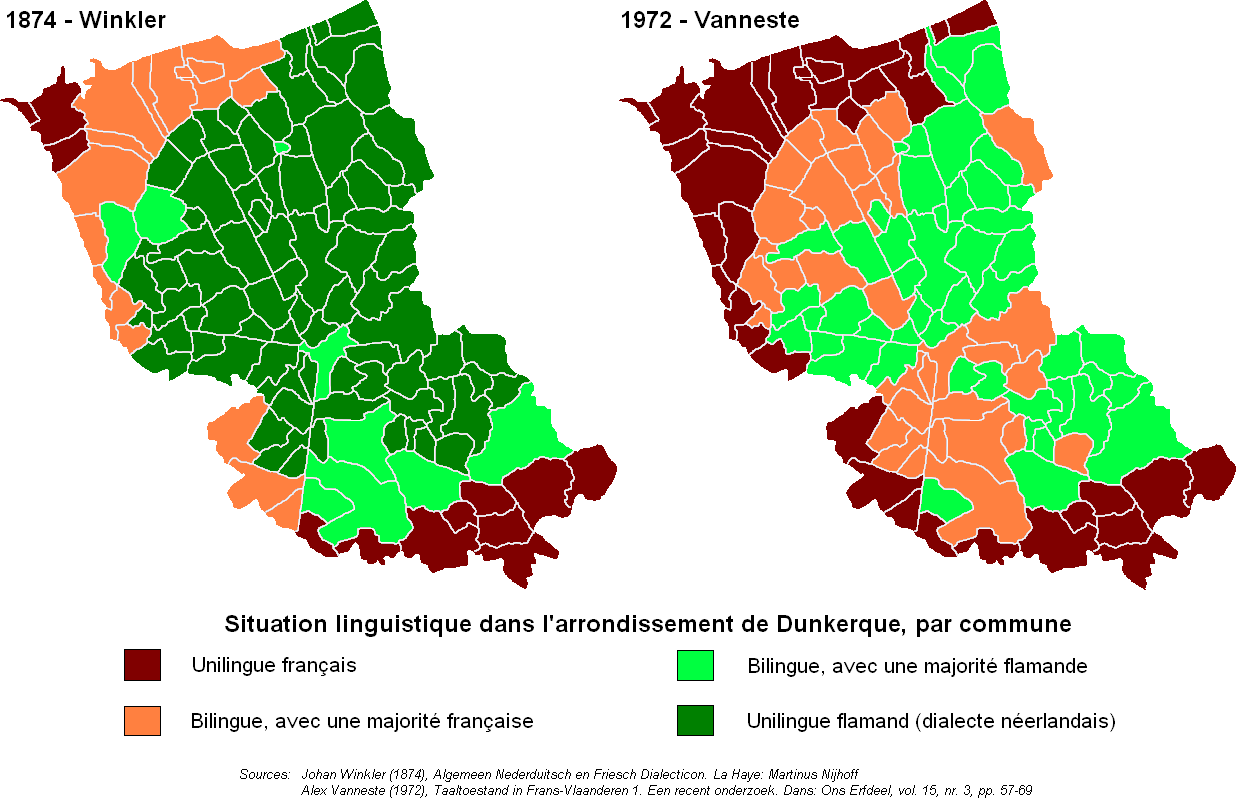 Situation linguistique dans l'arrondissement de Dunkerque, en 1874 et 1972, selon des recherches linguistiques. Fait moi-même.